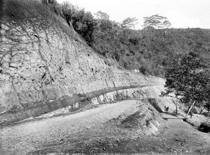 Repronegatief. Weg langs een kale steile wand in Tjibinong, West-Java